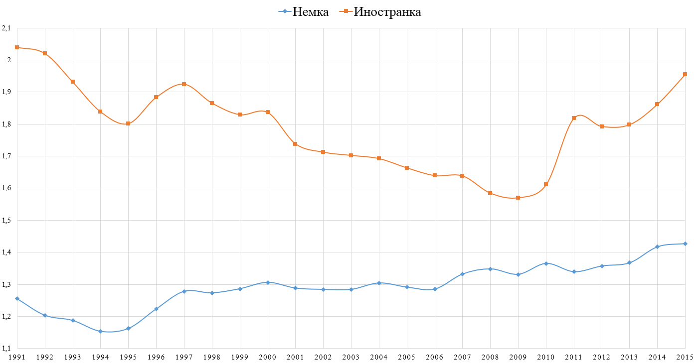 СКР по гражданству